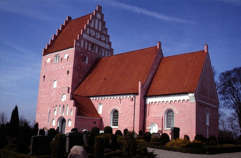 Aastrup Kirke i Danmark. Åstrup kirke